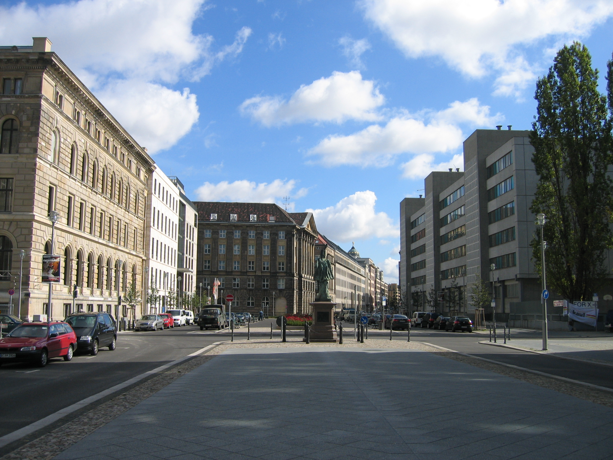 Mohrenstraße, Berlin-Mitte